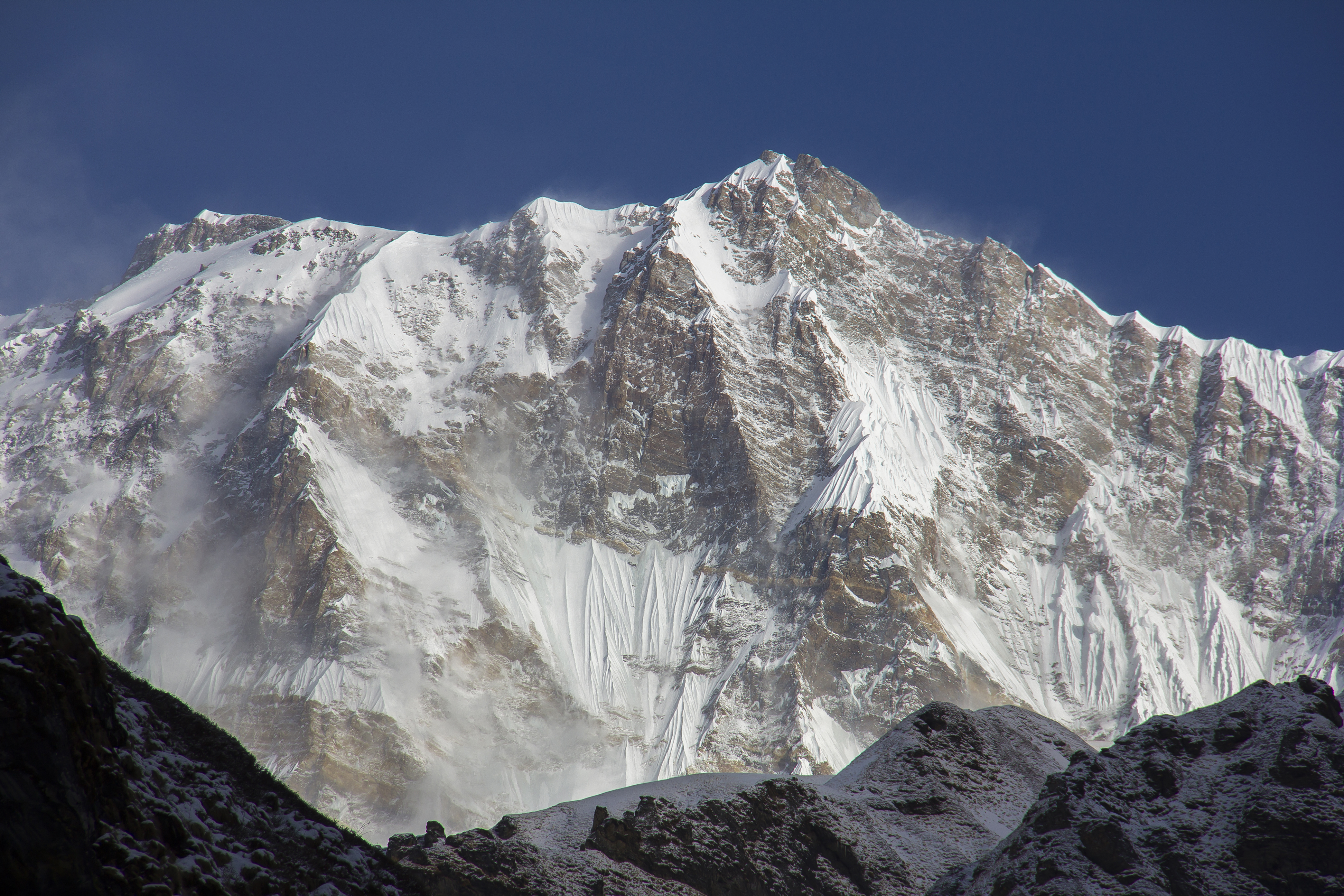 नेपाली: अन्नपूर्ण (प्रथम) ८,०९१ मि. हिमाल संसारको दशौं अग्लो र नेपालको नवौं अग्लो हिमाल हो। यसको उचाइ ८,०९१ मिटर छ।